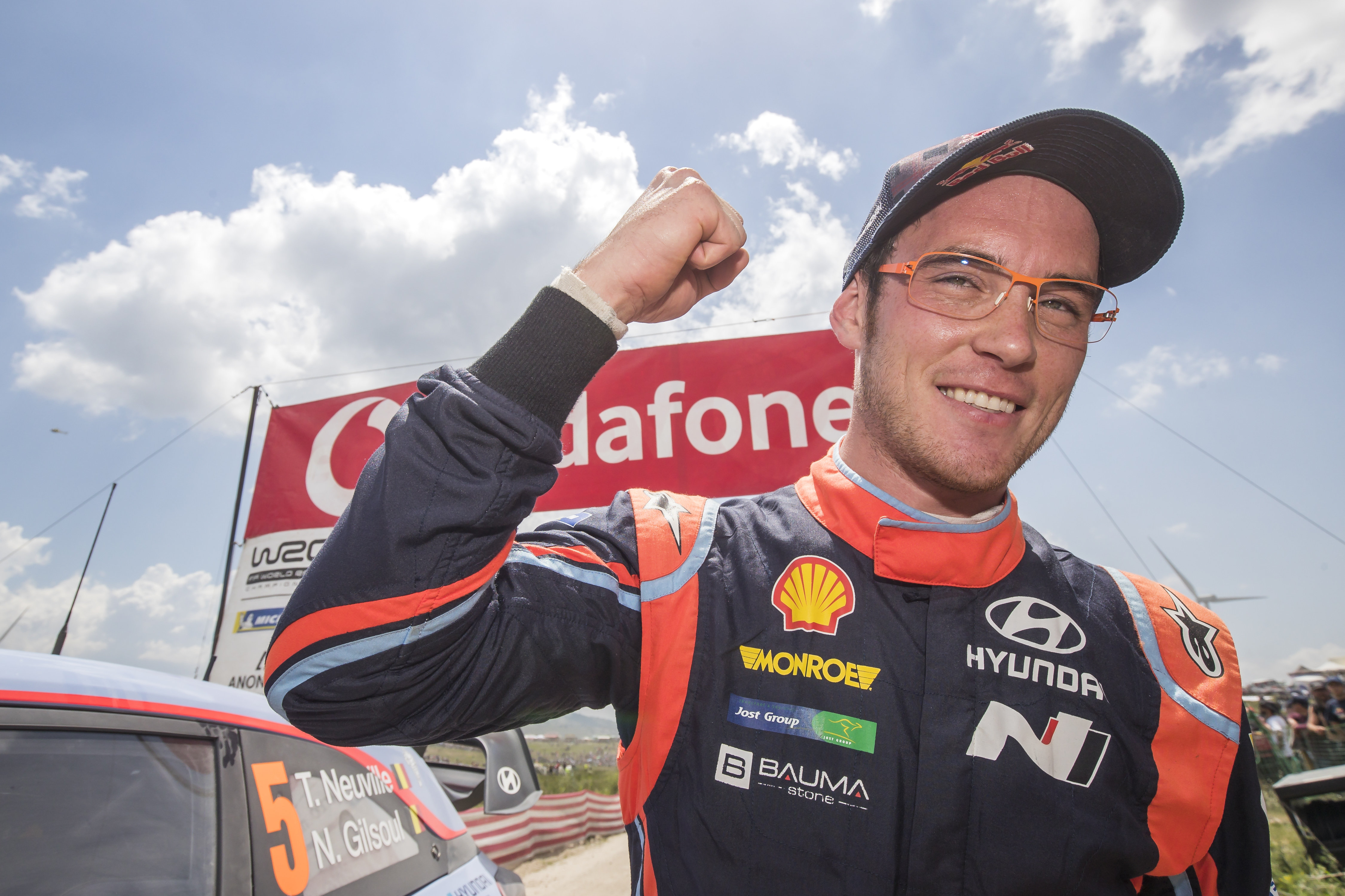 Thierry Neuville podczas Rajdu Portugalii 2018